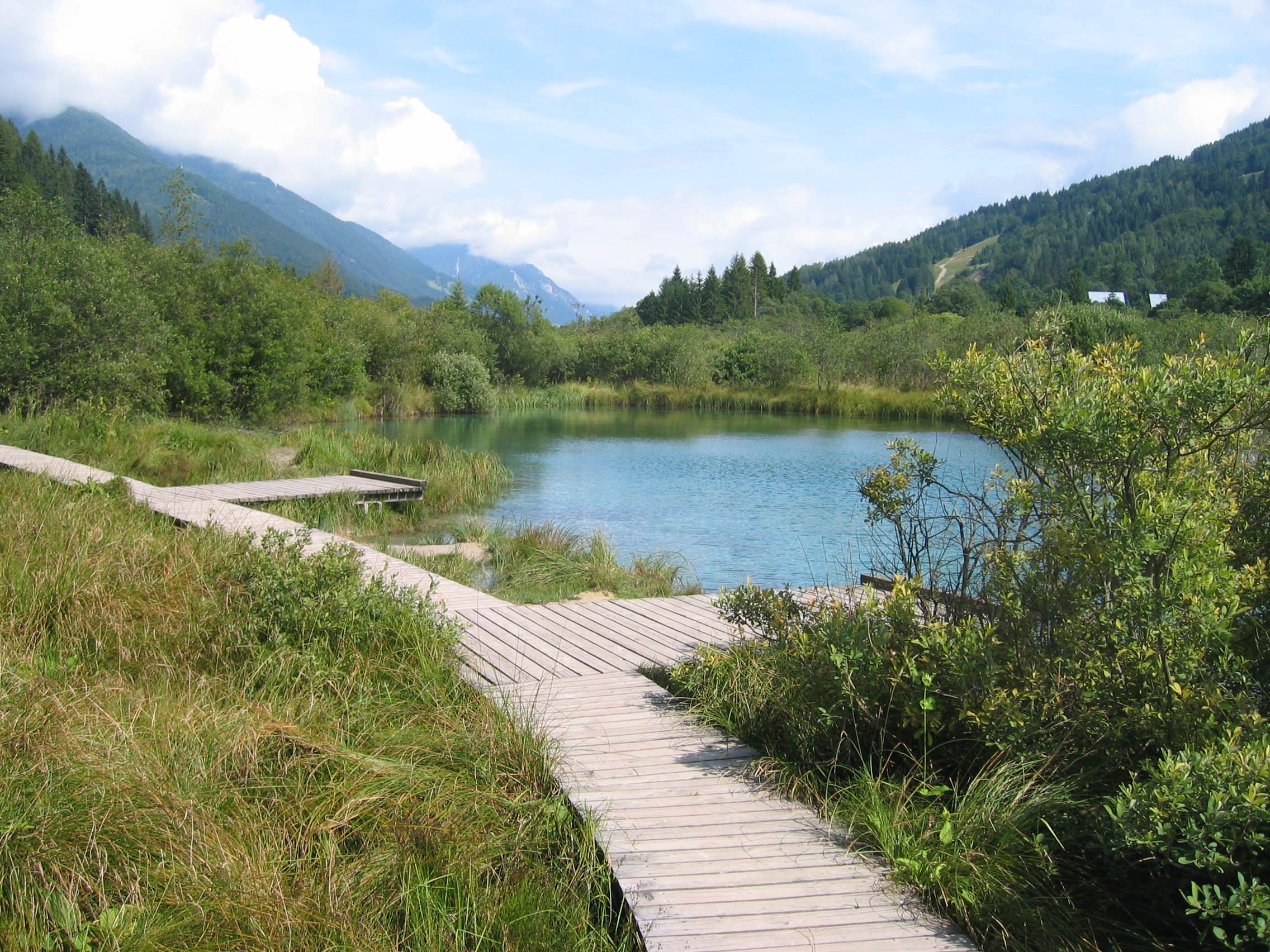 Zelenci, izvir Save Dolinke